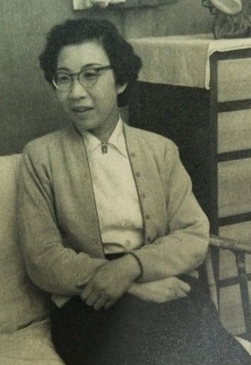 河原喜久恵